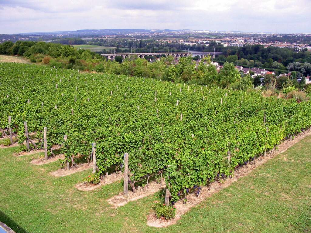 Vigne de Saint-Germain-en-Laye (Yvelines) Située en contrebas de la Terrasse de Le Notre, elle compte 1900 ceps (cépage Pinot noir), plantée en 2000. Photo JH Mora, août 2005